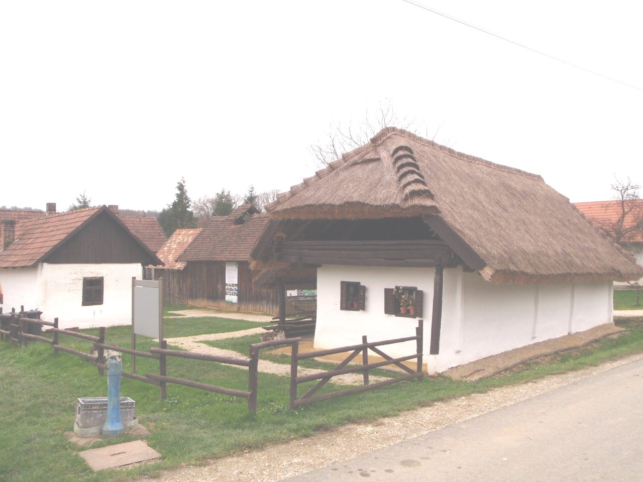 Magyarszombatfa Fazekasház Műemlék